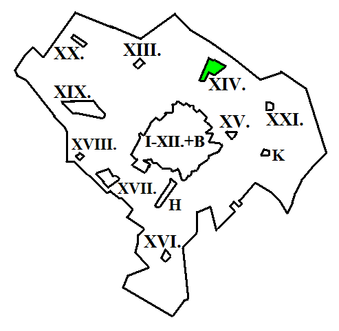 Kecskemét XIV. kerülete a térképen (Katonatelep)